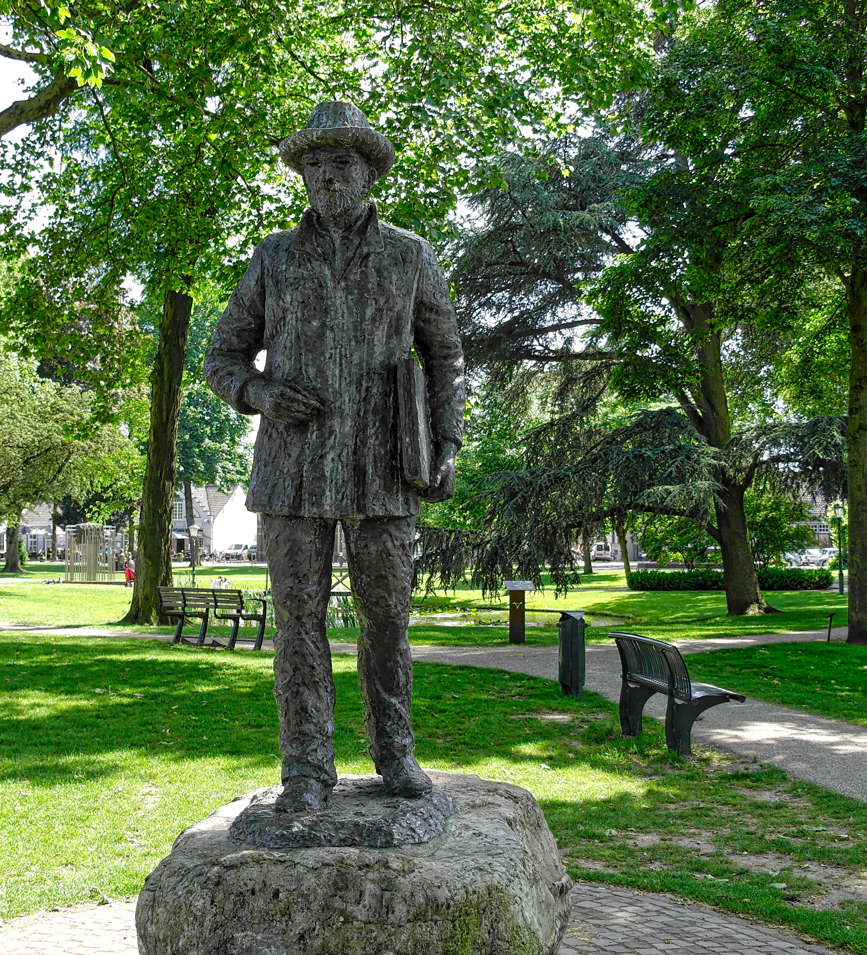 Standbeeld van Vincent van Goght in het centrum van Nuenen